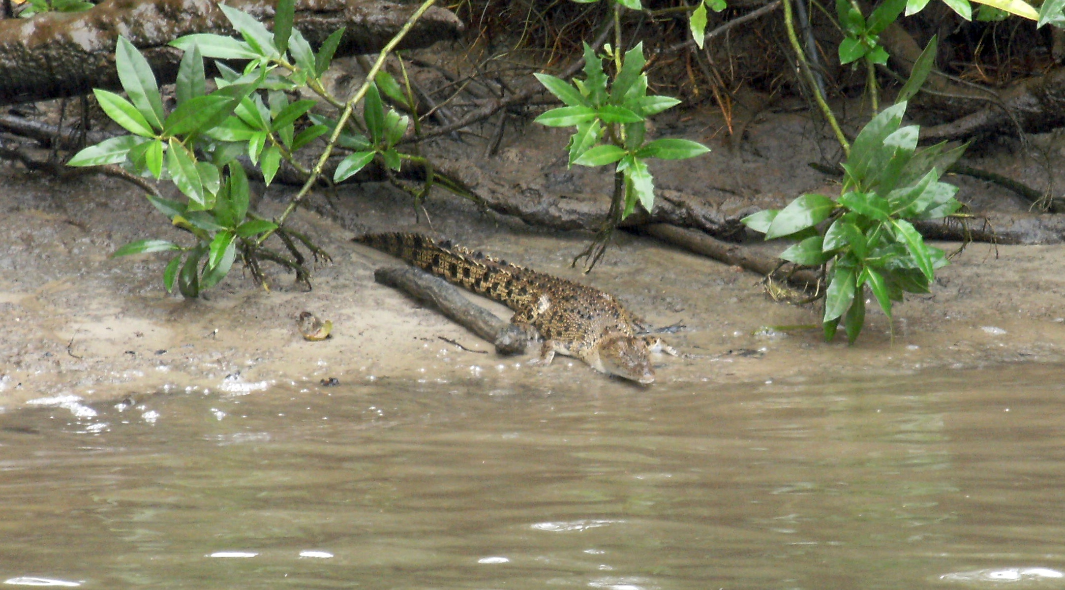 Juvenile crocodile